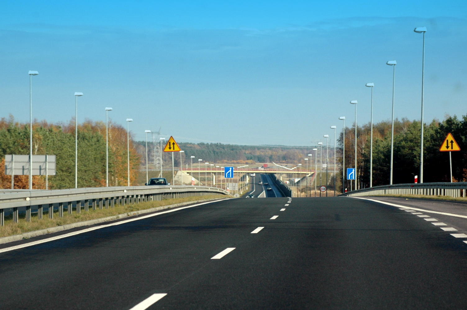 Obwodnica Kobylanki w ciągu drogi krajowej nr 10.